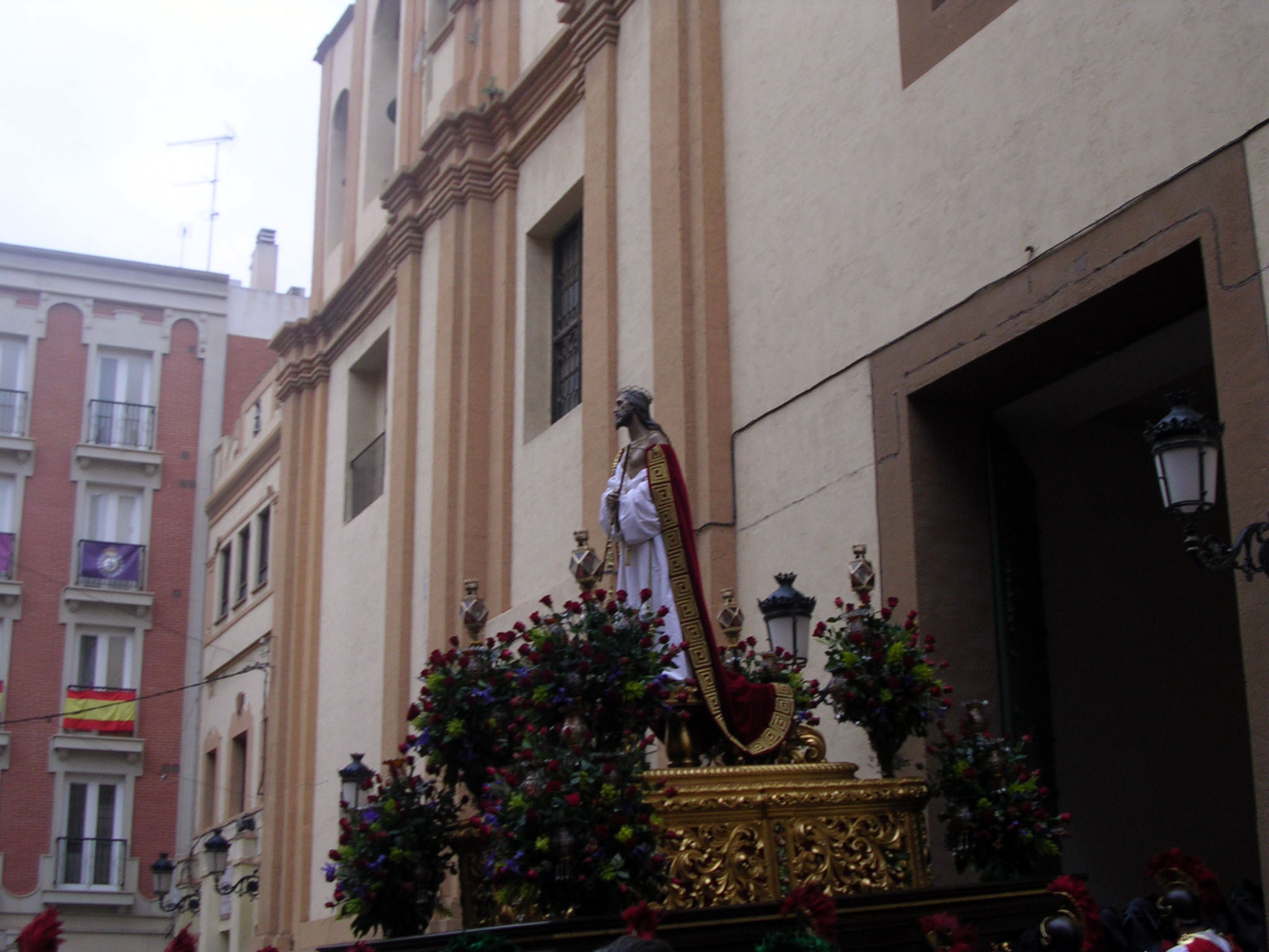 Trono del Ecce Homo (Californios) en la calle del Aire. Jueves Santo, Cartagena